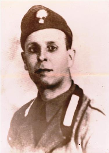 Il carabiniere ravellese Pasquale Sacco durante la II Guerra Mondiale